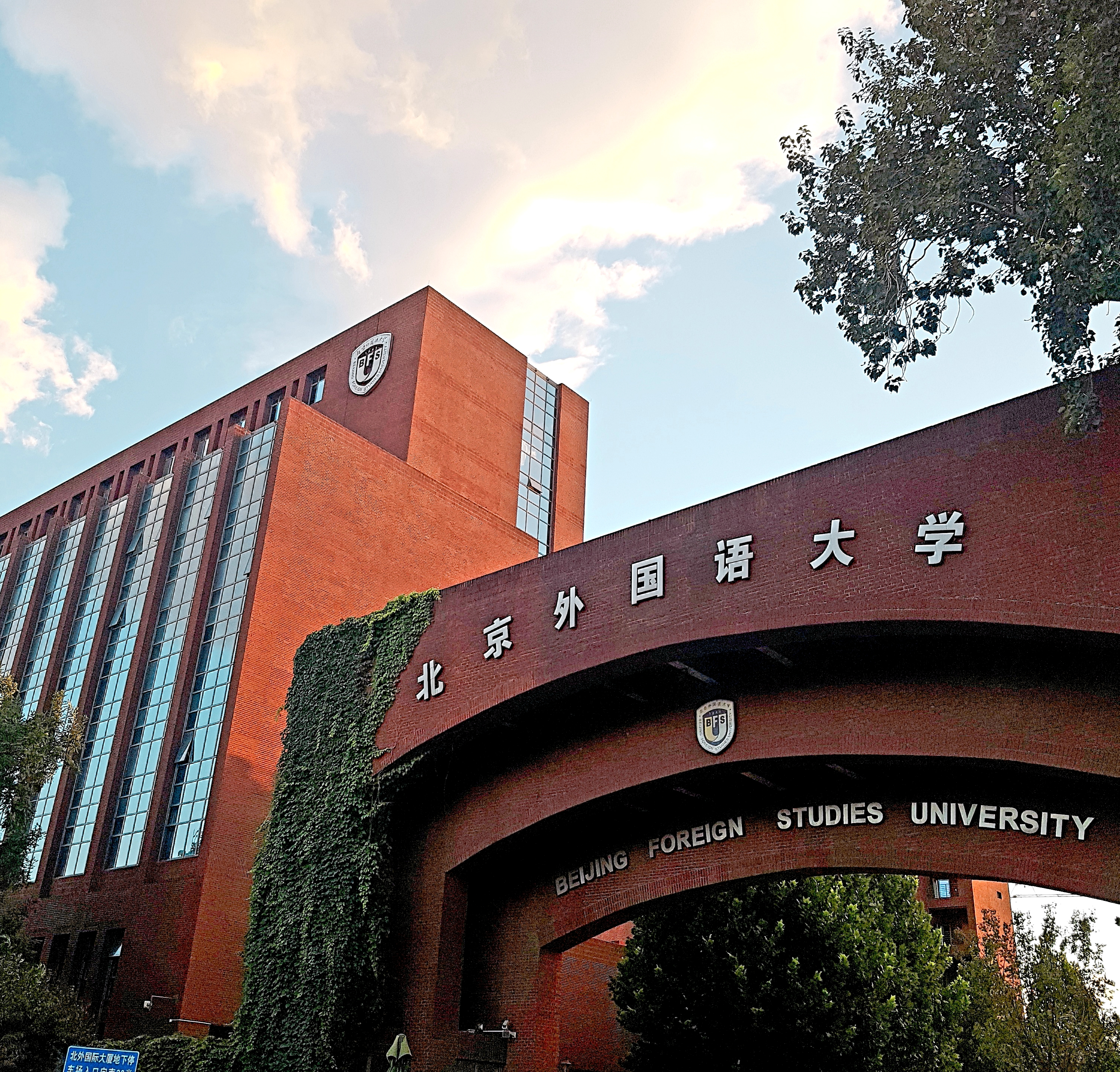 北京外國語大學西院